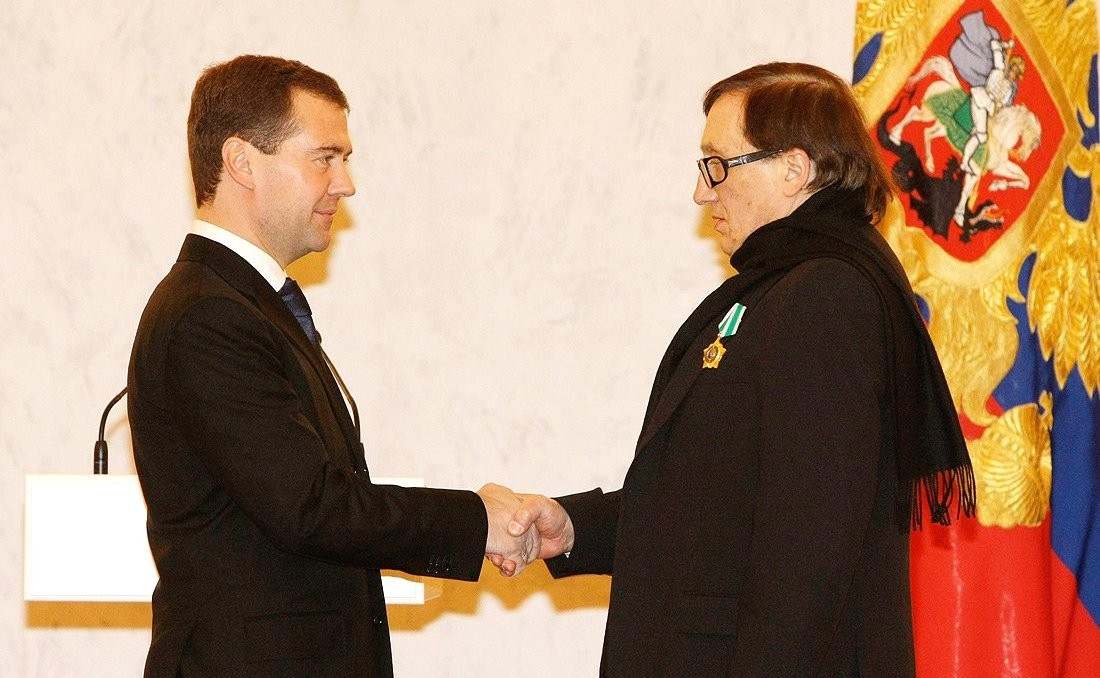 Дмитрий Медведев награждает Орденом Почёта Михаила Шемякина